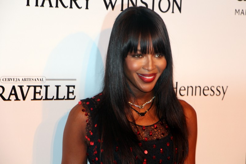 3 - Naomi Campbell-001